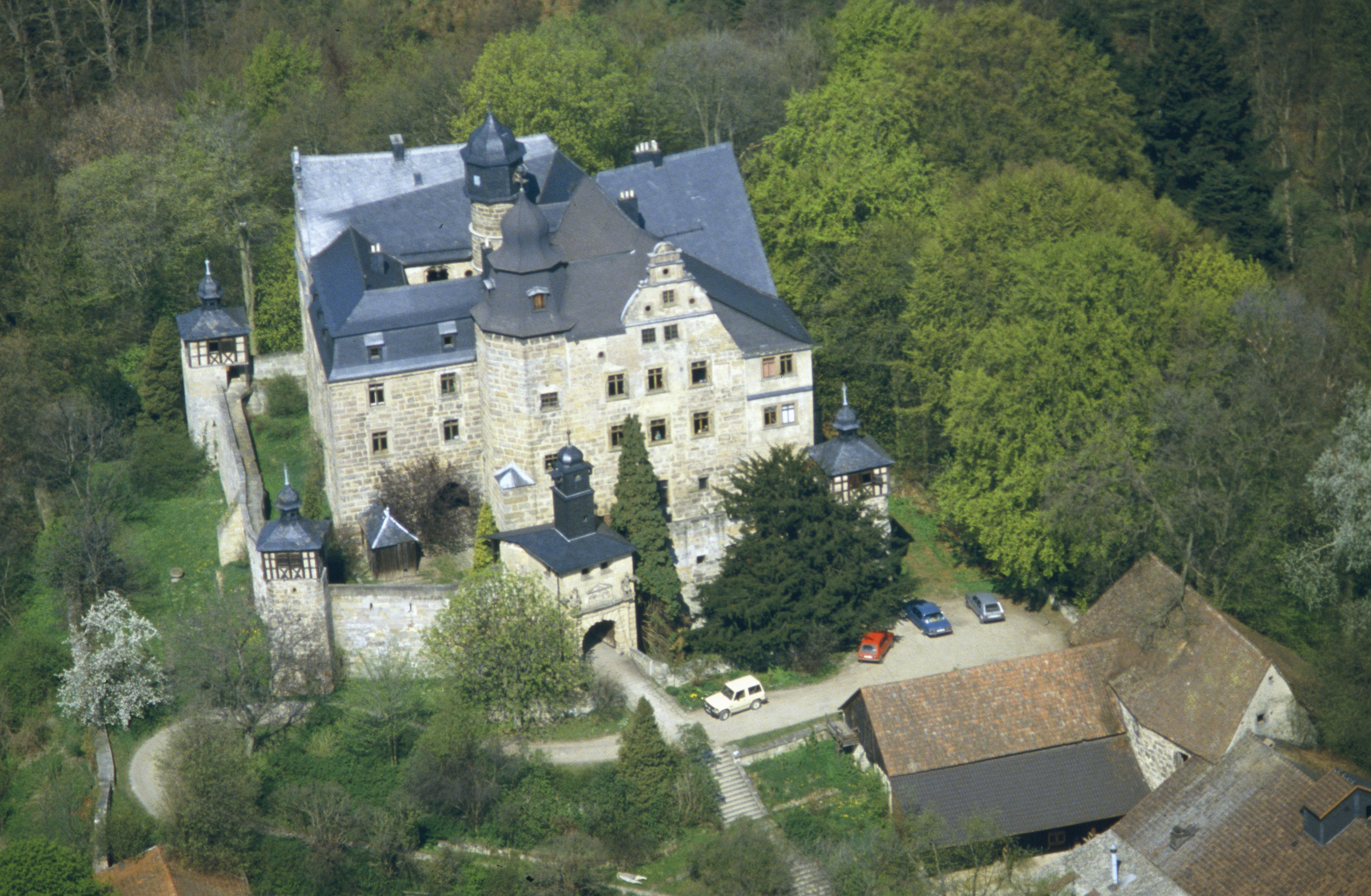 Schloss Wernstein